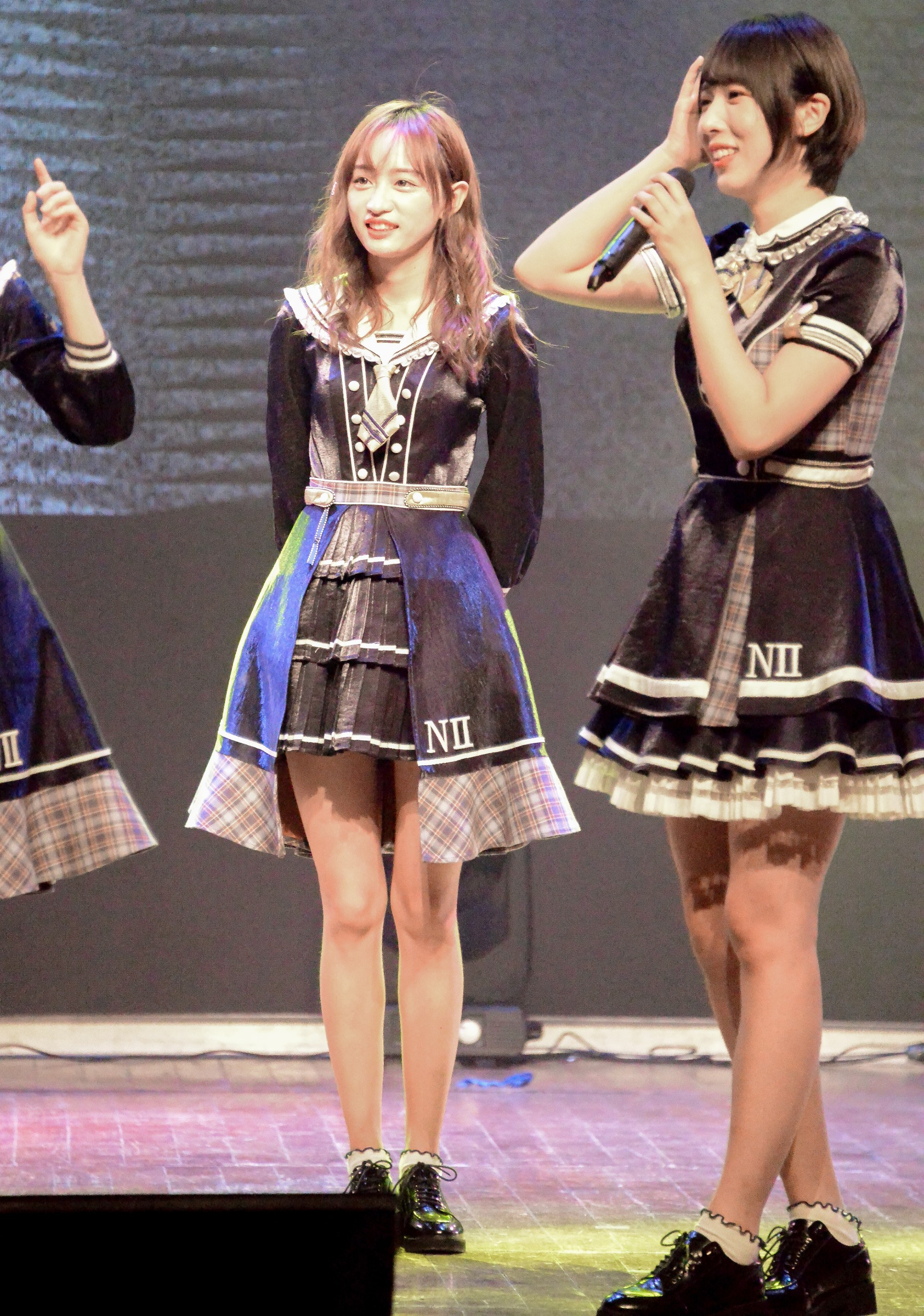 180525长沙咪咕巡演实图